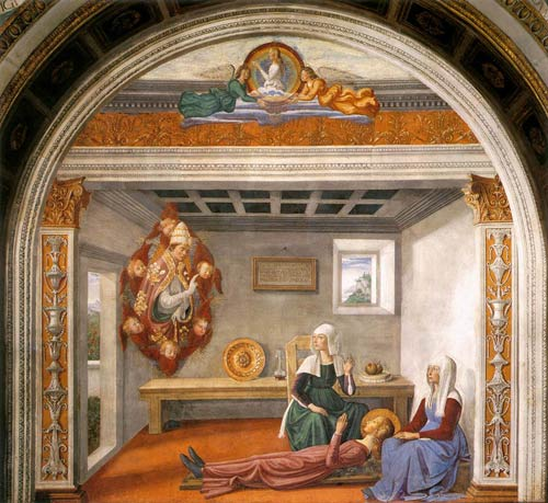 Fresco. Gregorius de Grote kondigt de dood aan van de Heilige Fina.